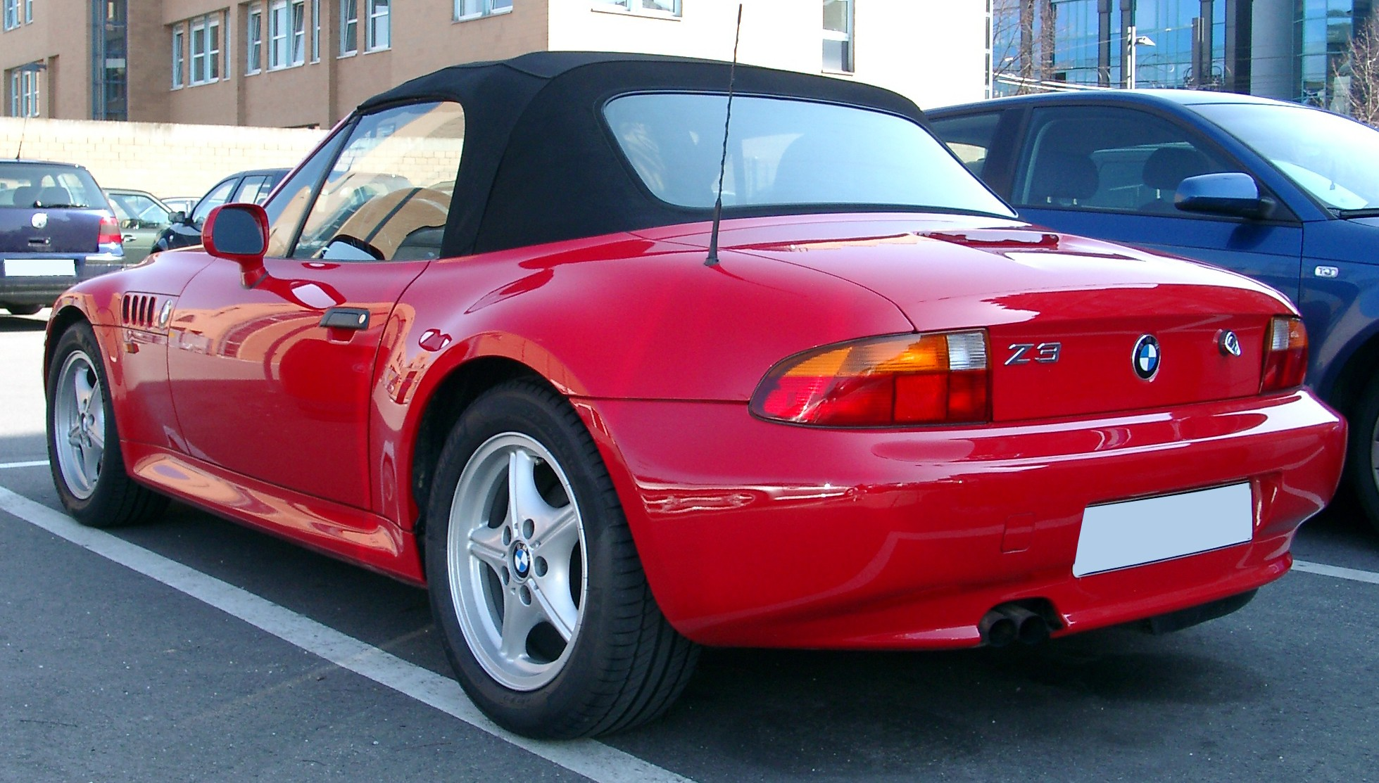 BMW Z3